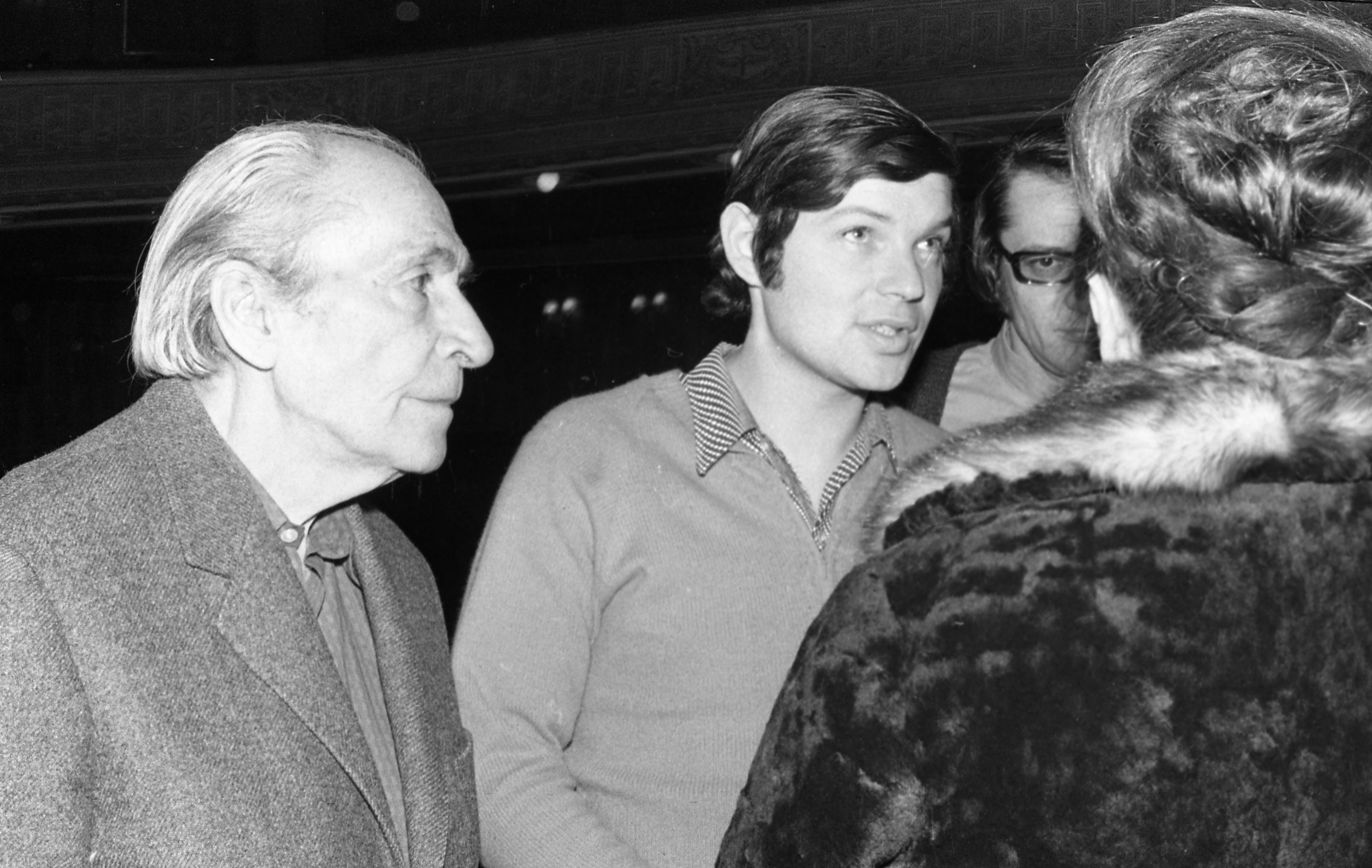 Vígszínház, a Képzelt riport egy amerikai popfesztiválról című musical írója, Déry Tibor, és rendezője, Marton László. Location: Hungary, Budapest XIII. Tags: Budapest Title: Vígszínház, a Képzelt riport egy amerikai popfesztiválról című musical írója, Déry Tibor, és rendezője, Marton László.